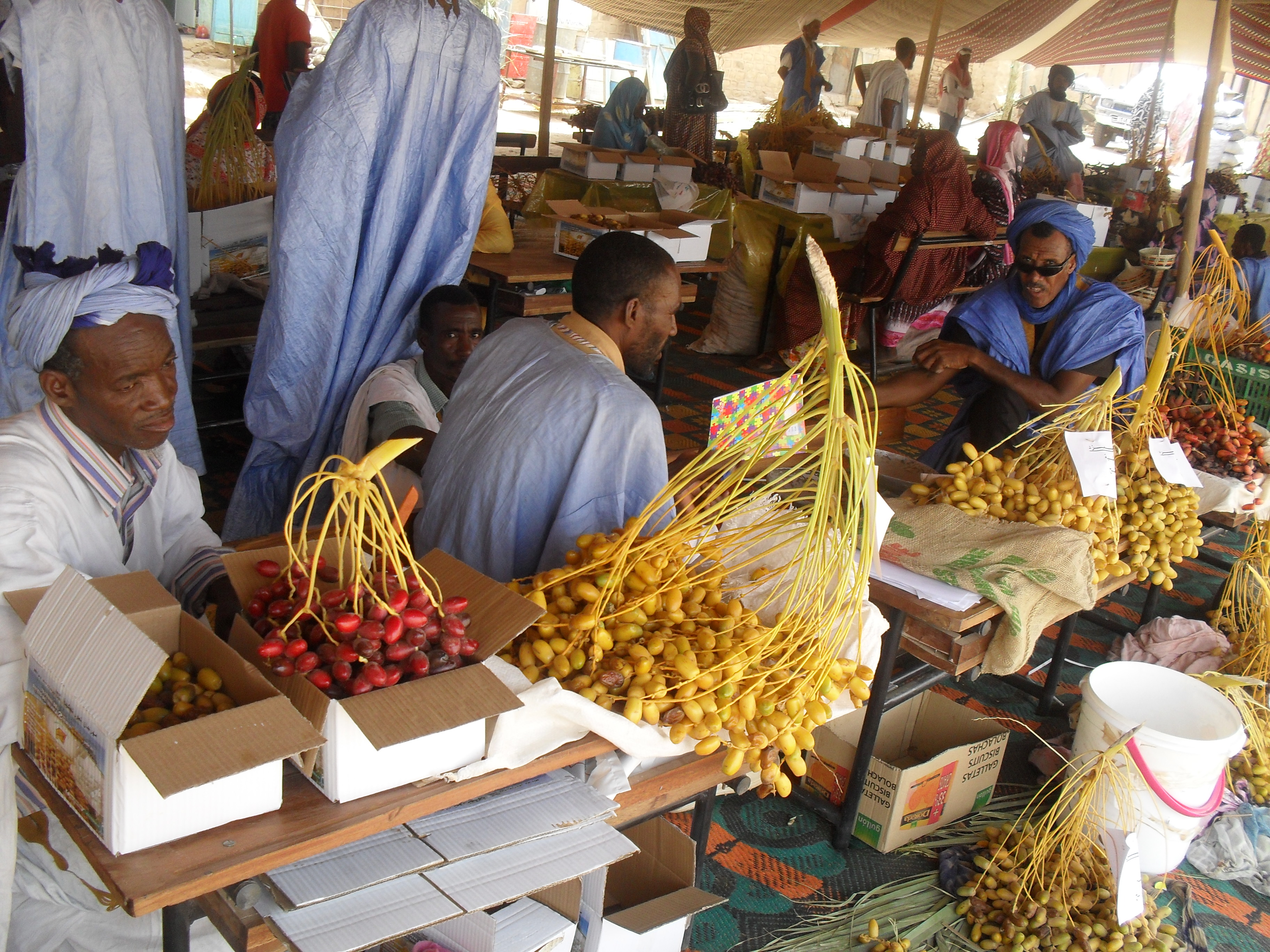 [Jemal Oumar] The dates market in Tidjikja received an important boost from visitors to a recent festival. سوق التمور في بلدة تجكجة يشهد إقبالا كبيرا من الزوار الذين قدموا لحضور المهرجان Les marchés aux dattes de Tidjikja a bénéficié d'un important afflux de visiteurs lors d'un récent festival.